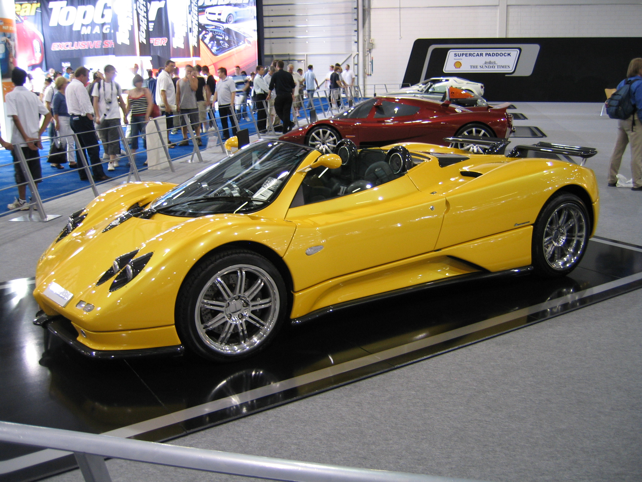 Pagani Zonda Roadster